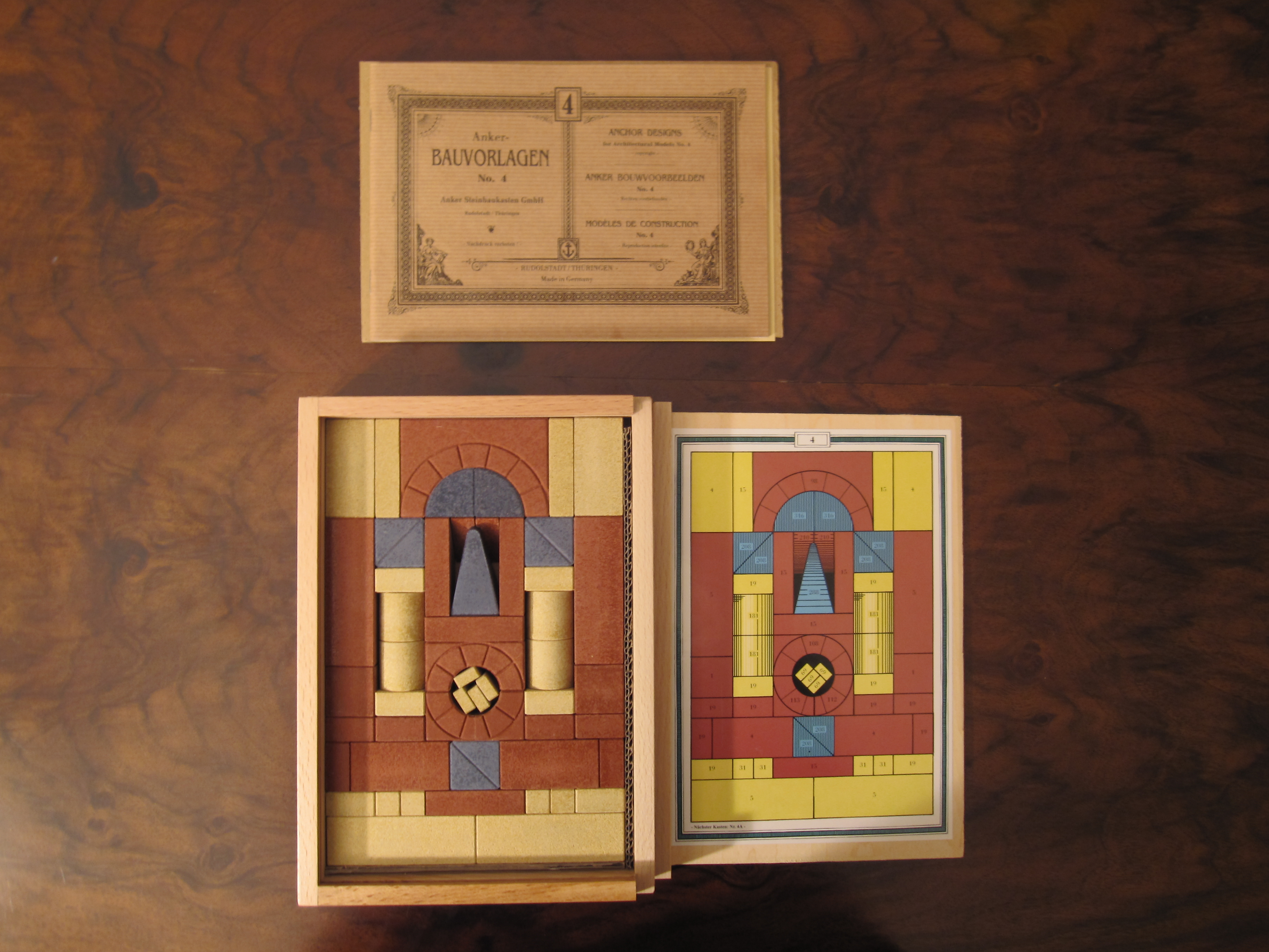 Anker-Steinbaukasten #4